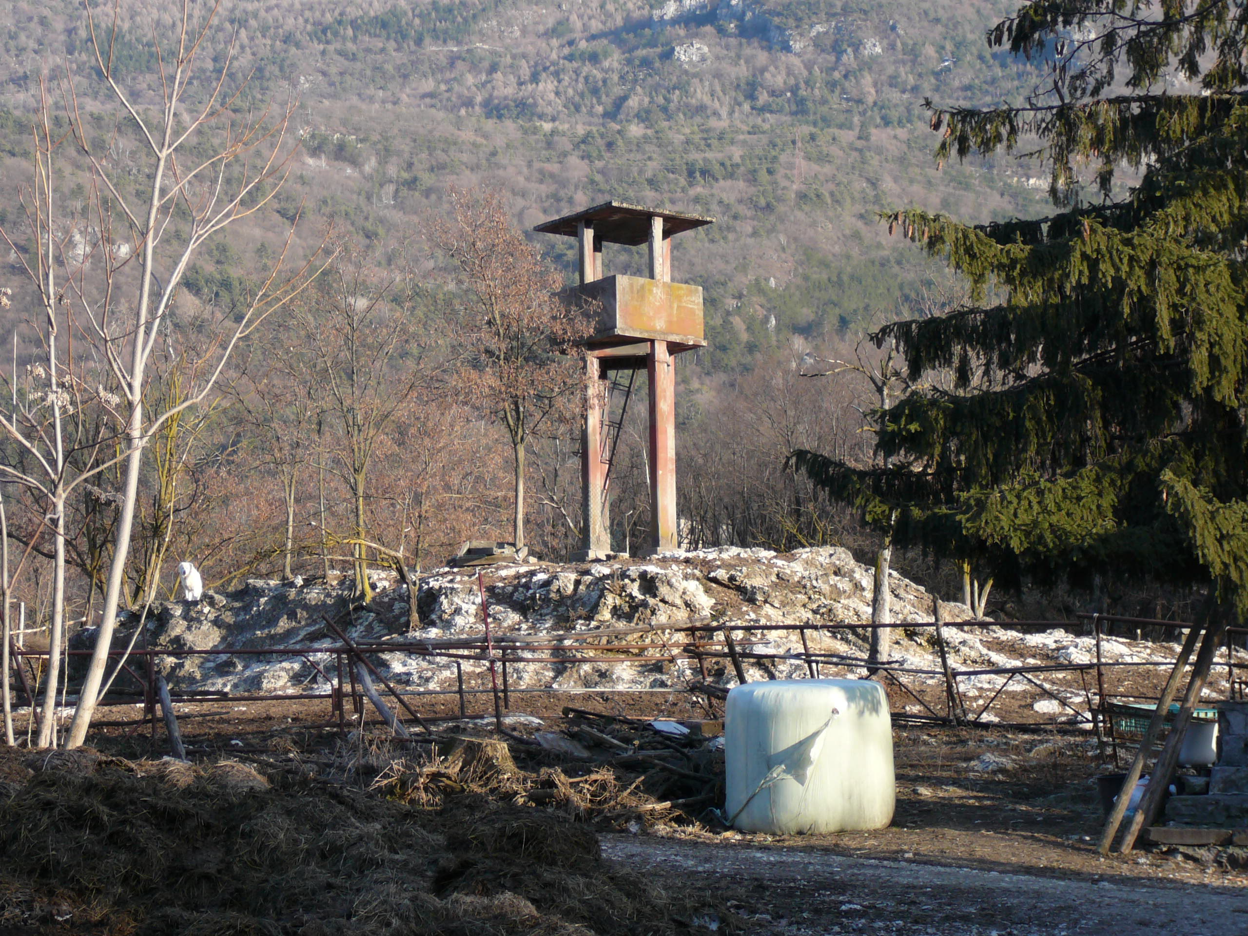 Forte san Rocco